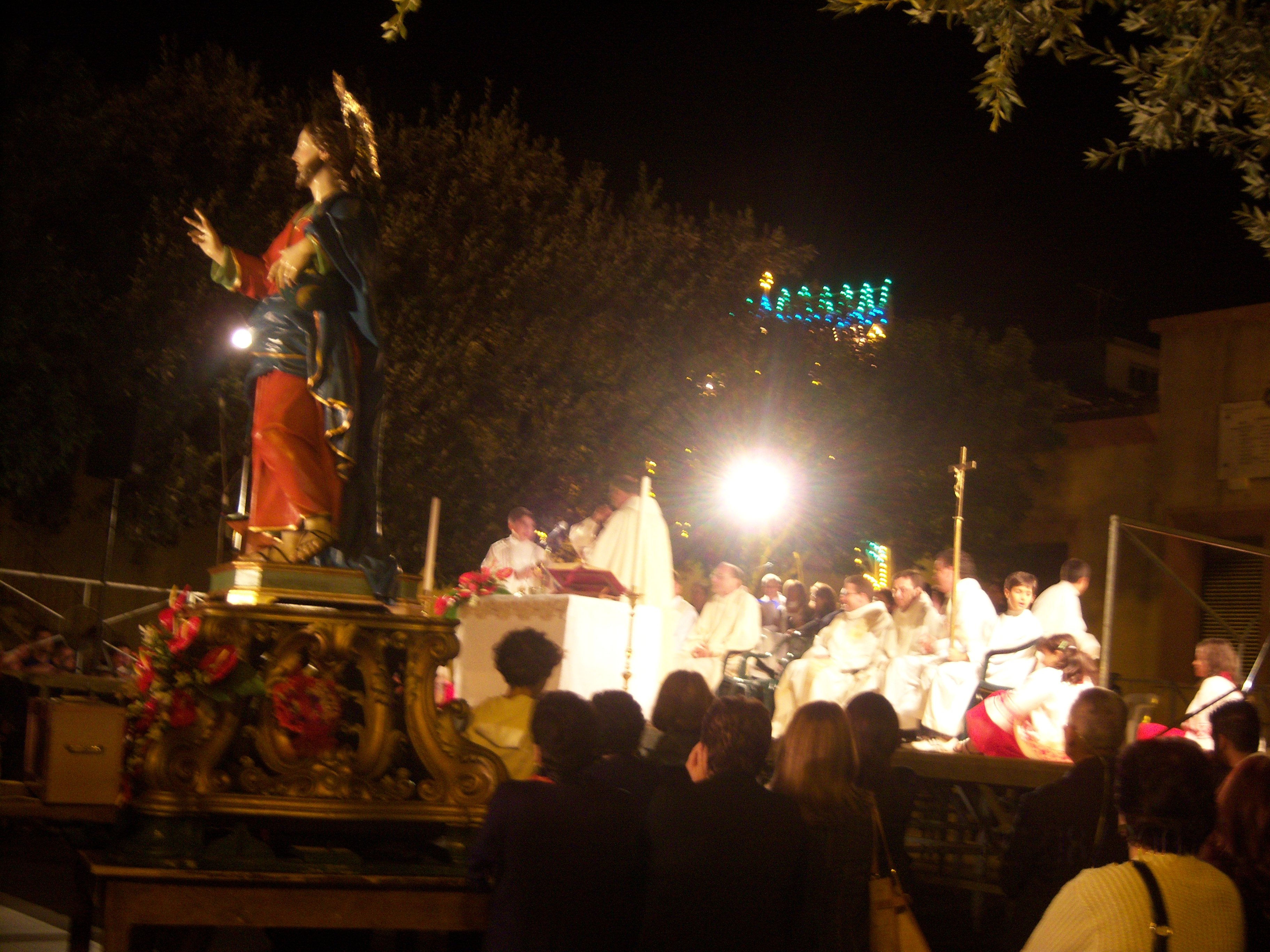 Santo Salvatore celebrazione messa